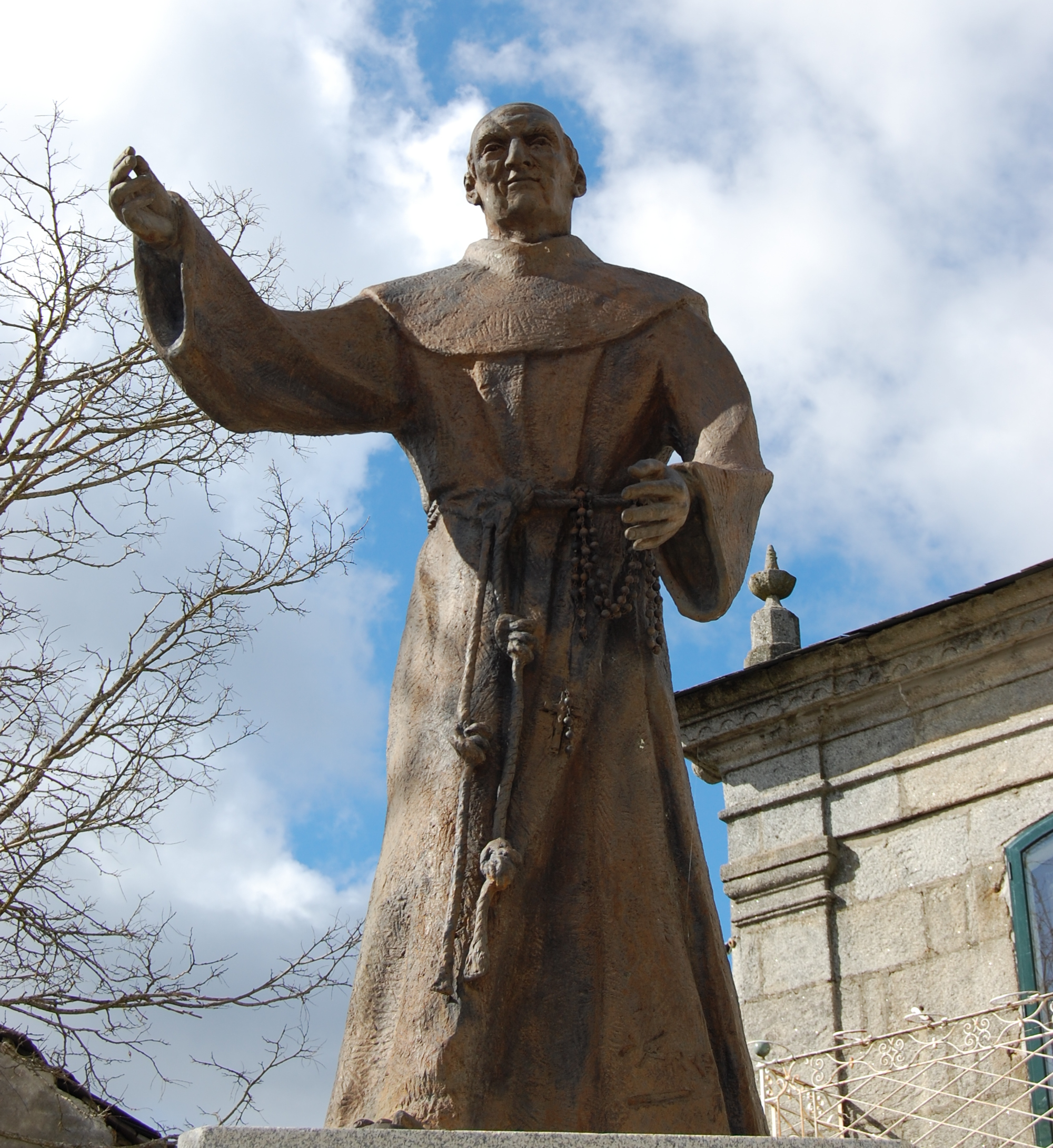 Estátua do beato Sebastião de Aparício em A Gudiña (província de Ourense, Espanha).